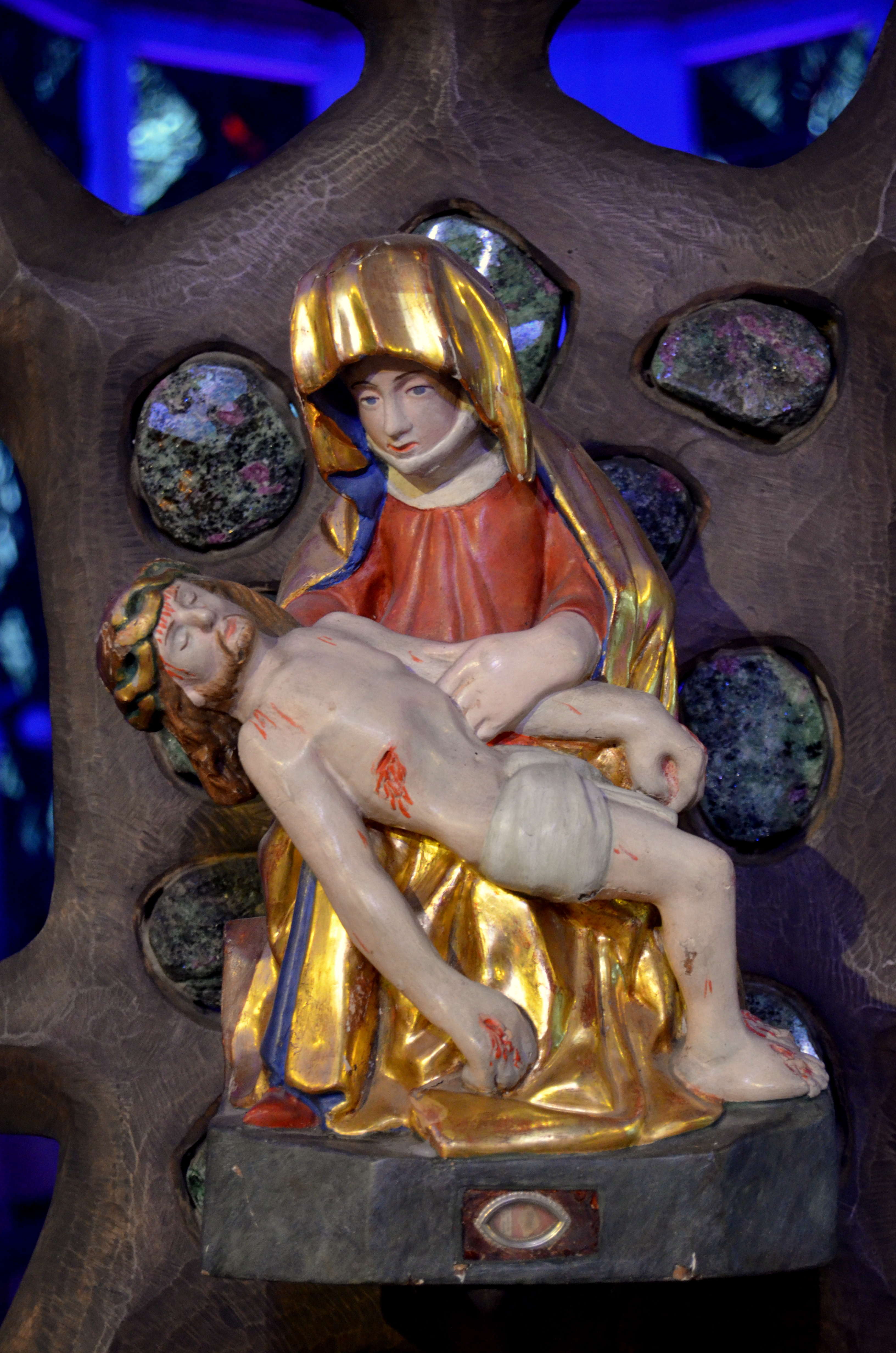 Genadebeeld van Onze-Lieve-Vrouwe (circa 1500)